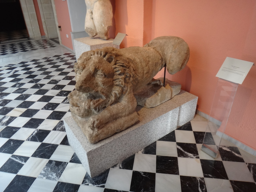 Colección Arqueológica Municipal de Jerez de la Frontera